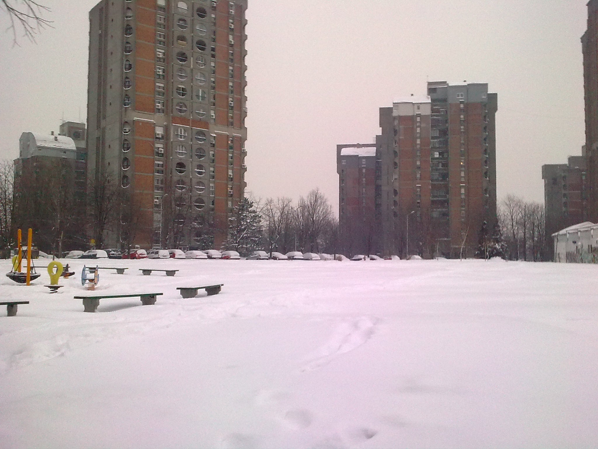 Зимске чаролије на Видиковачком Венцу. Свеже направљен парк (крајем 2011.) и снегом прекривене површине.